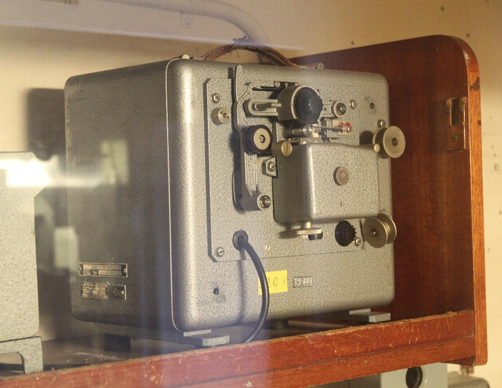 Hell Streifenschreiber (Morse Übungsgerät) UR39C Aufgenommen an Bord von Minenjagdboot "Weilhelm" M1077 in Wilhelmshaven